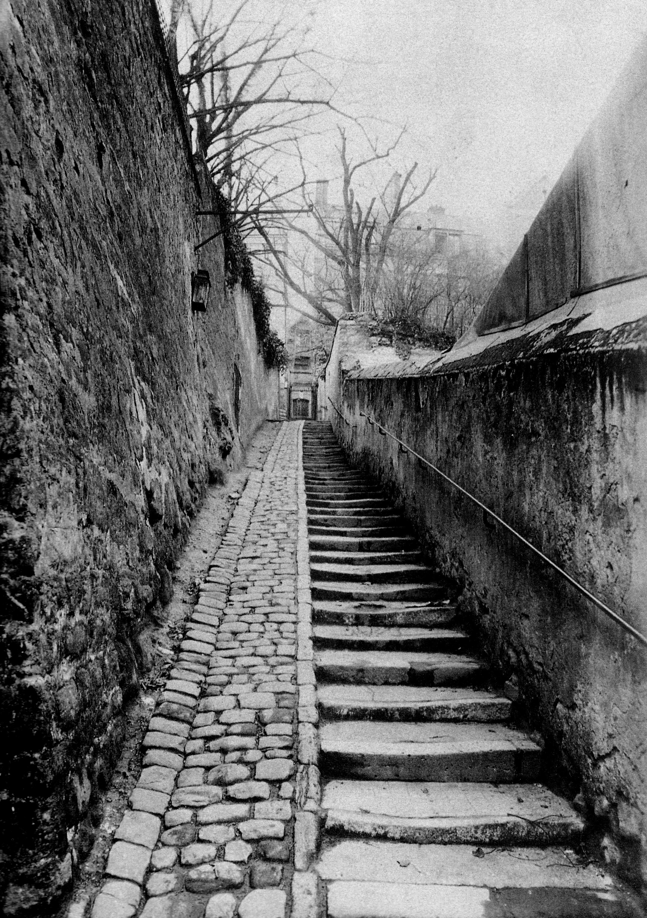 Vue de la rue des Eaux (vers la rue Raynouard). Mars 1901, phtoto d'Eugène Atget